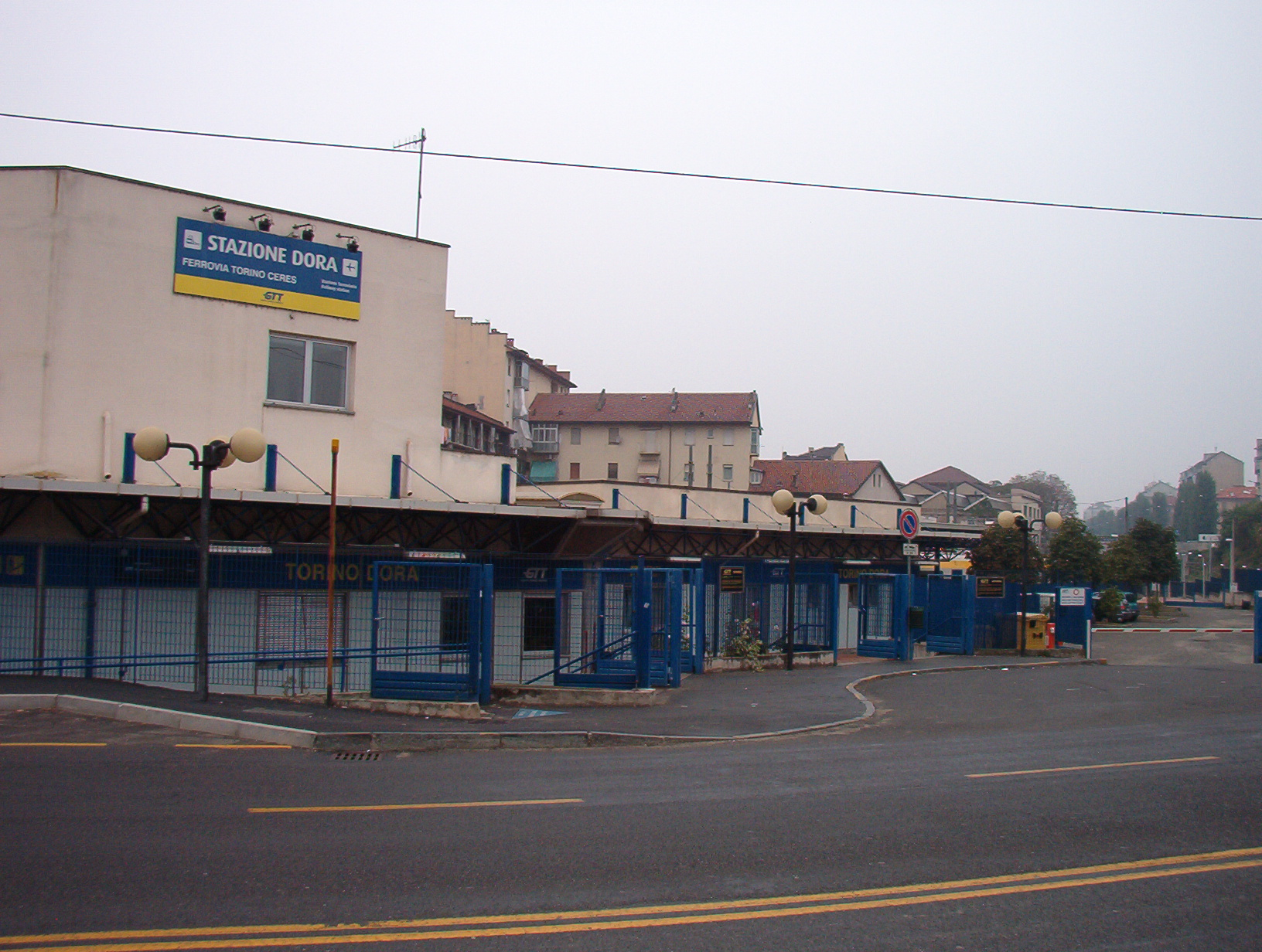 Stazione ferroviaria Dora GTT - Torino - Italy